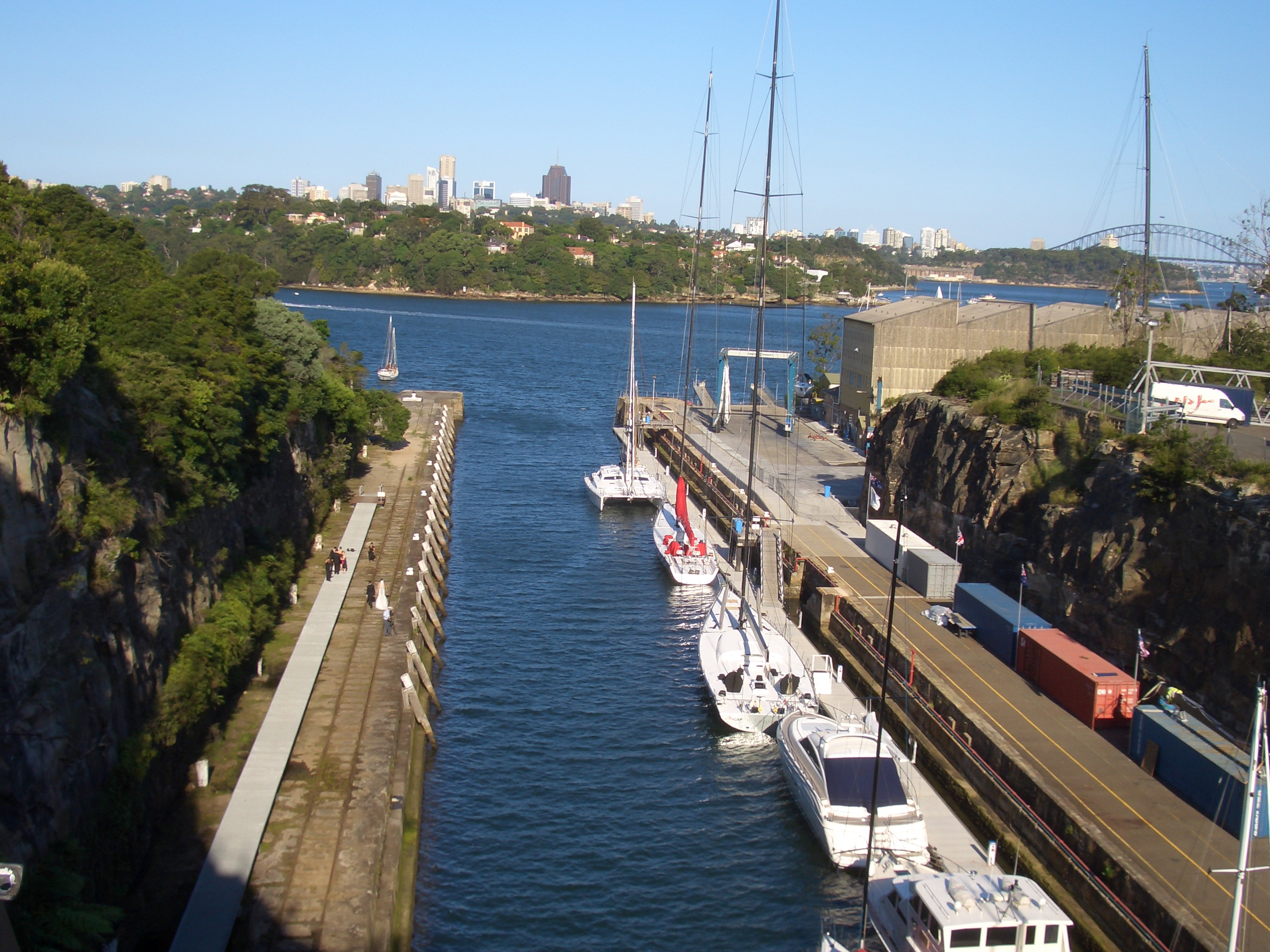 Woolwich Docks, Sydney